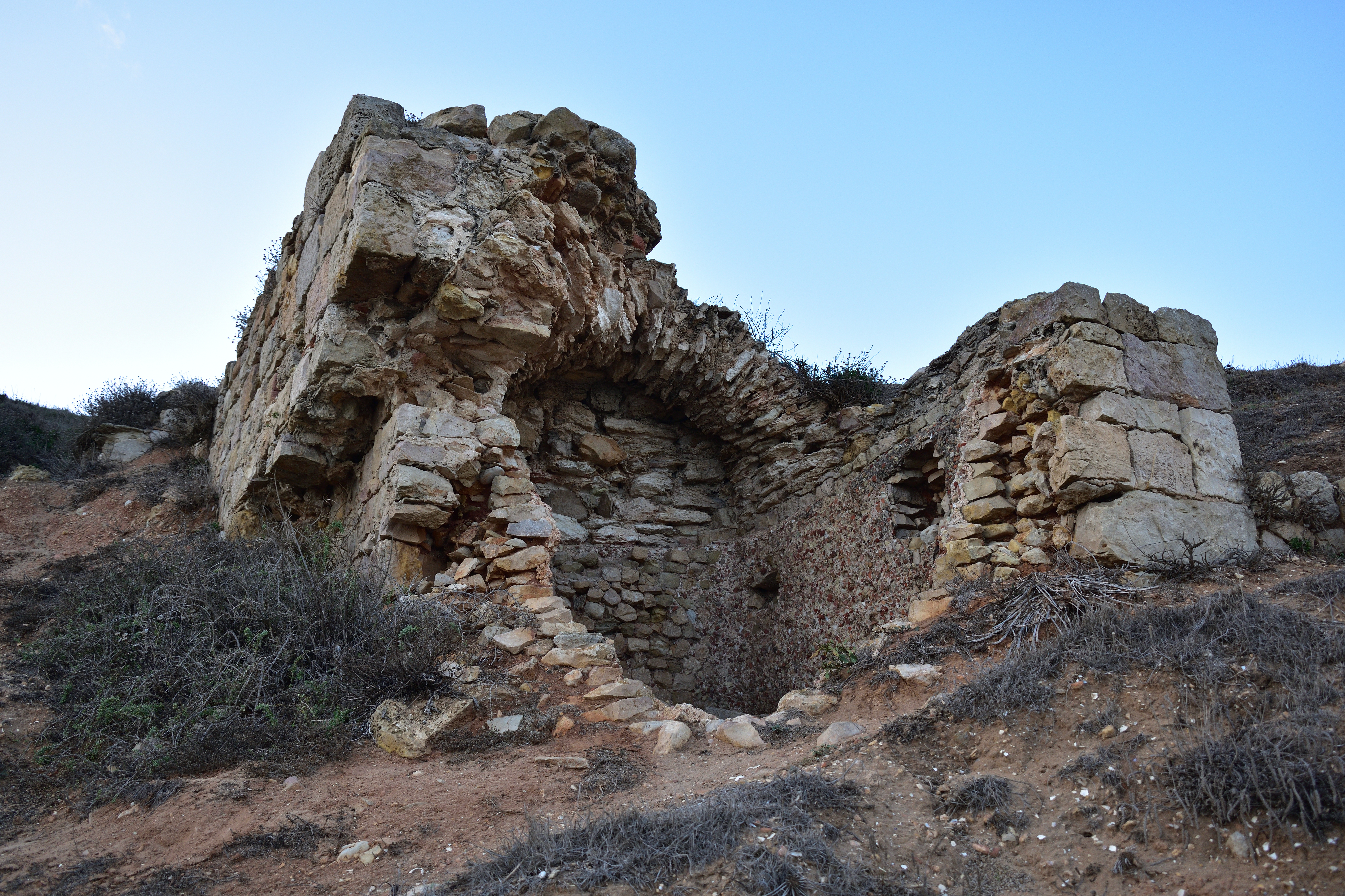 Ruínas romanas da Boca do Rio, no concelho de Vila do Bispo, em Portugal.